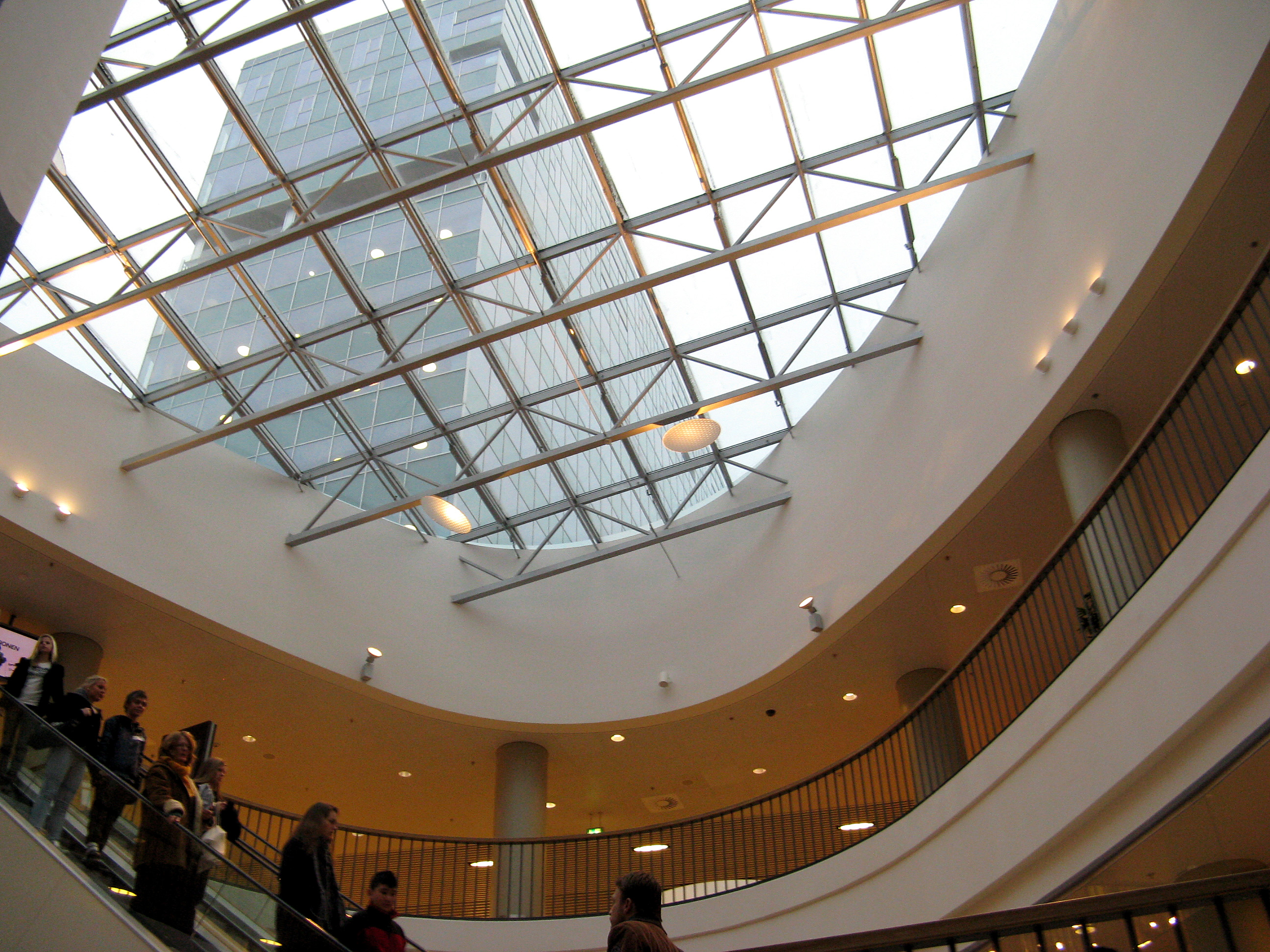 Bruuns Galleri i Århus